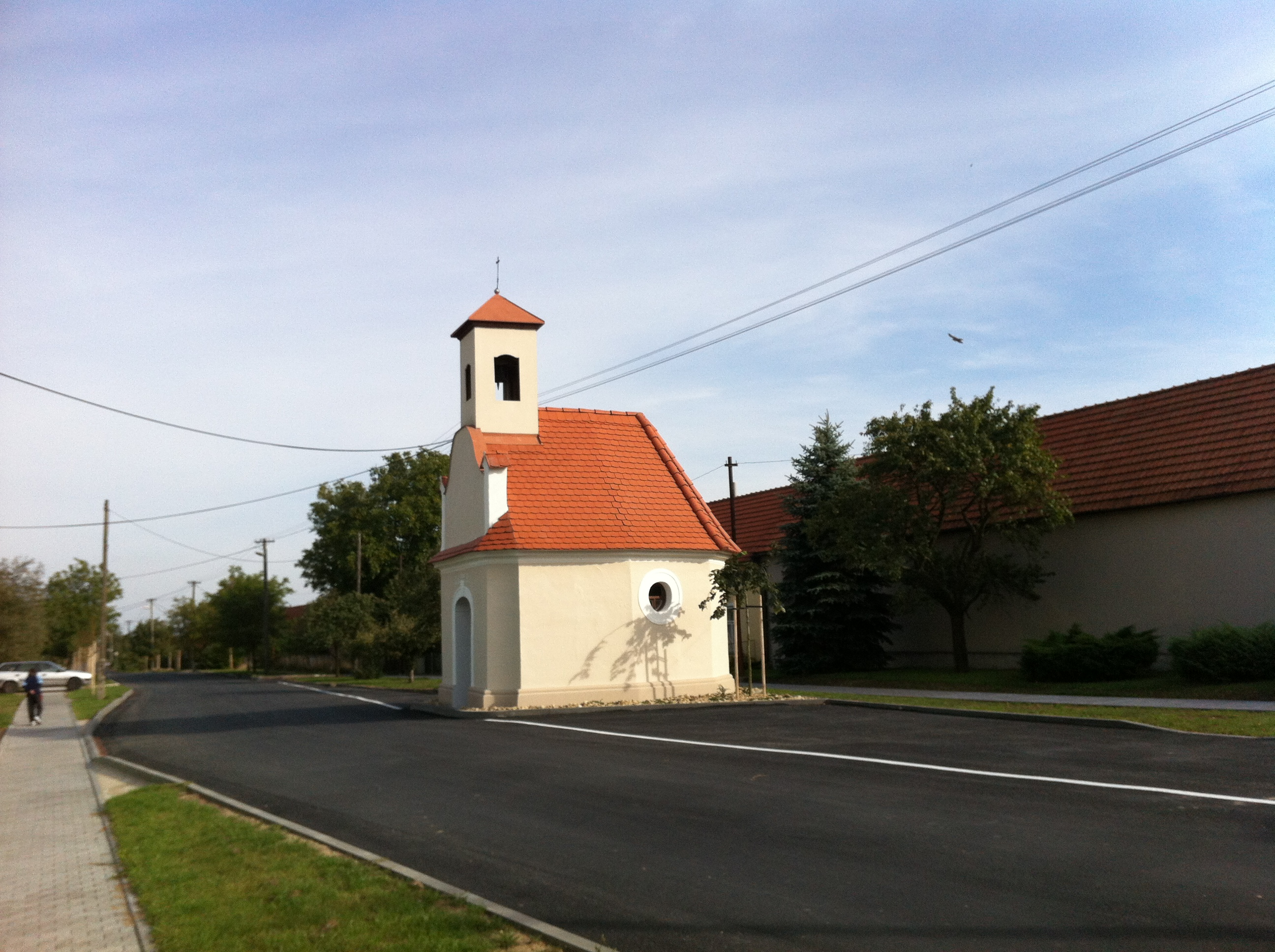 Kaplička P. Marie (Prokopov), v obci při silnici směr Jiřice, Prokopov